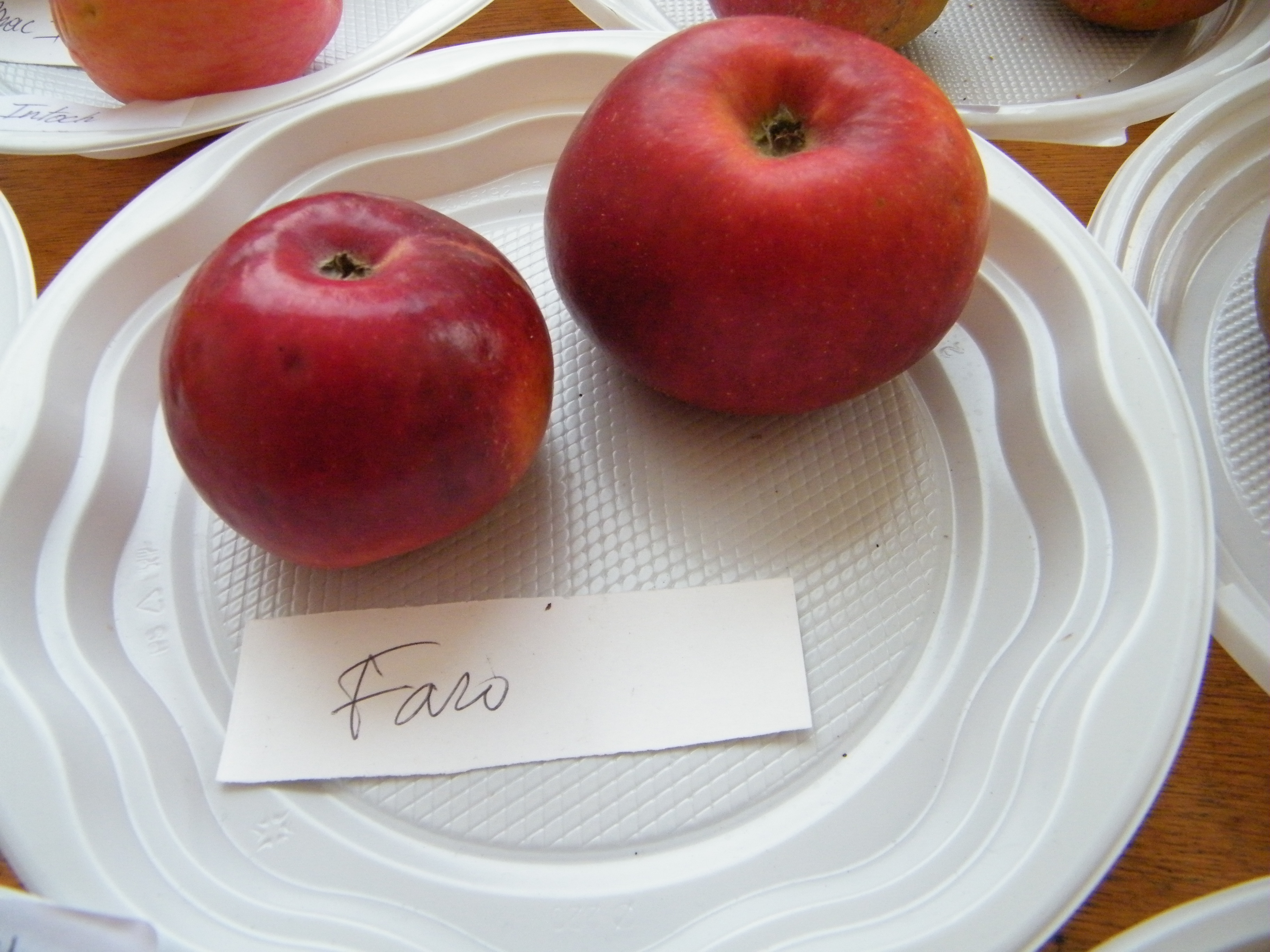 Faro, Mons-Boubert, Somme, Fr, expo du 29-10-2017 (3)